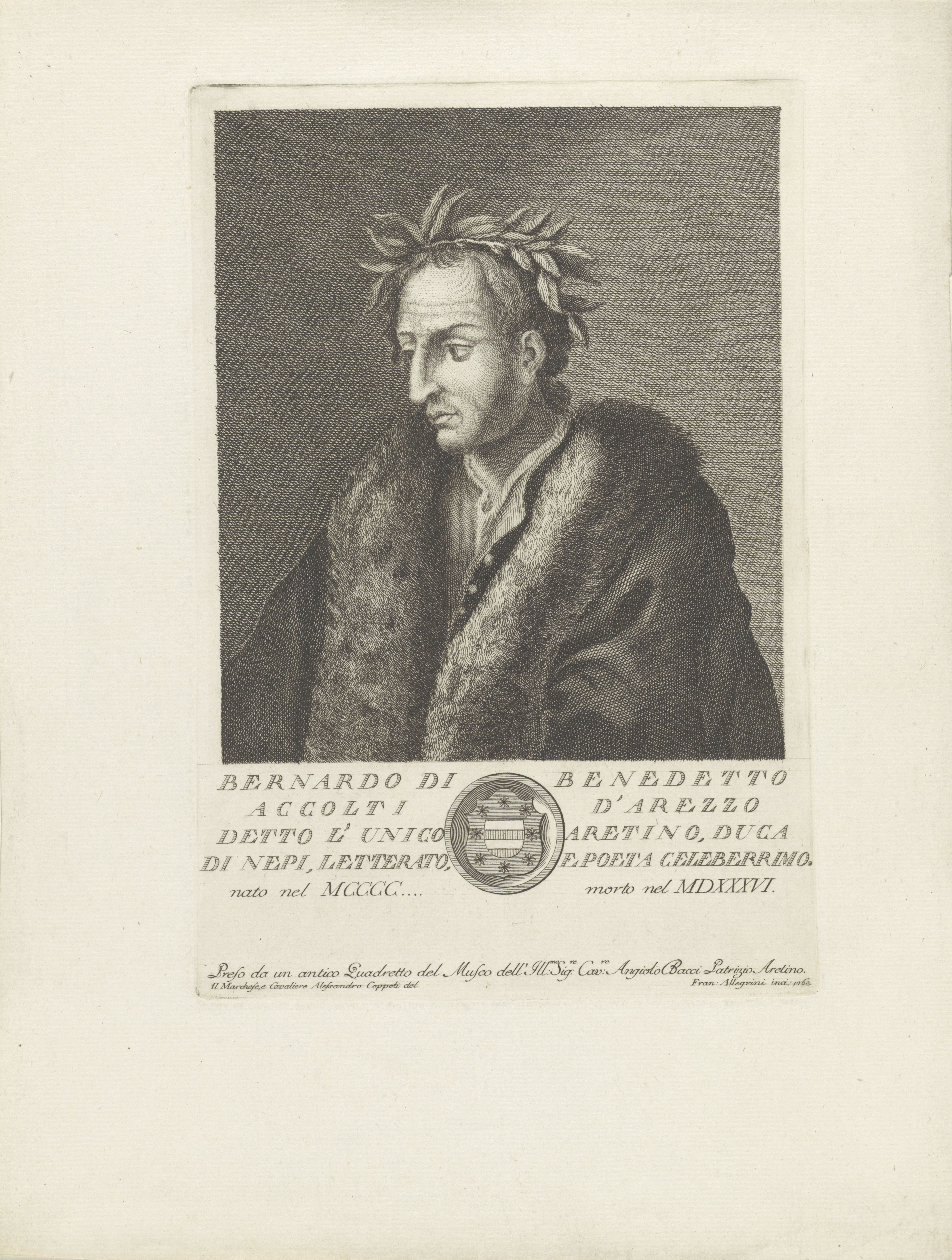 IdentificatieTitel(s): Portret van Bernardo AccoltiPortretten van beroemde Italianen met wapenschild in ondermarge (serietitel)Objecttype: prent Objectnummer: RP-P-1909-4600Opschriften / Merken: verzamelaarsmerk, verso, gestempeld: Lugt 2228Omschrijving: Portret van Bernardo Accolti. Hij draagt een met bont gevoerde mantel en op zijn hoofd een laurierkrans. Onder het portret een tekst in het Italiaans en een wapenschild in een cirkelvormig kader.VervaardigingVervaardiger: prentmaker: Francesco Allegrini (vermeld op object)naar tekening van: Alessandro Coppoli (vermeld op object)Plaats vervaardiging: ItaliëDatering: 1763Fysieke kenmerken: gravureMateriaal: papier Techniek: graveren (drukprocedé)Afmetingen: plaatrand: h 294 mm × b 199 mmToelichtingDeze prent maakt deel uit van een reeks portretprenten van onbekende omvang. De prenten zijn gemaakt door meedere prentmakers, onder Wie: Francesco Allegrini en Carlo en Raimondo Faucci.OnderwerpWat: historical personsWieBernardo AccoltiVerwerving en rechtenVerwerving: aankoop 1905Copyright: Publiek domein